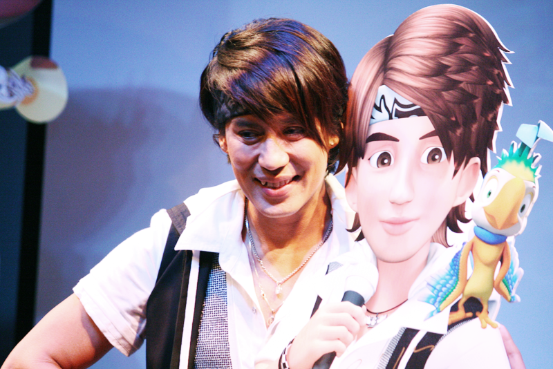 Byrd Land แดนมหัศจรรย์